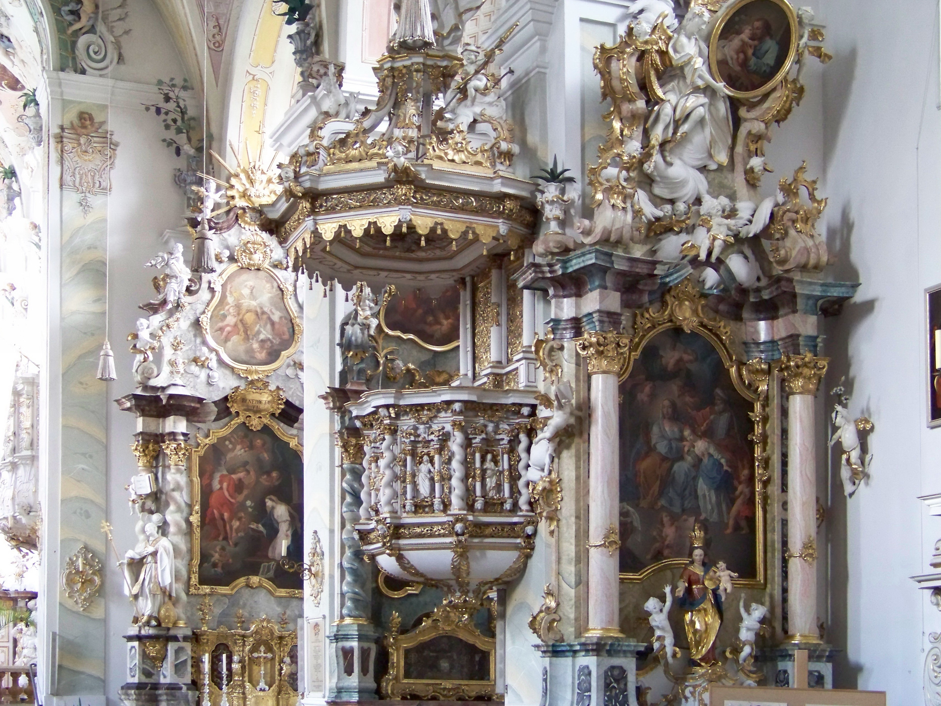 Mallersdorf-Pfaffenberg, Klosterberg 2. Katholische Pfarrkirche, ehemalige Klosterkirche St. Johannes Evangelist. Türme, Langhauskern und Westportal vor 1265, Chor 1463, wesentlicher Umbau 1613, Vorbau um 1755, Ausstattung im Laufe des 18. Jahrhunderts. Kanzel.